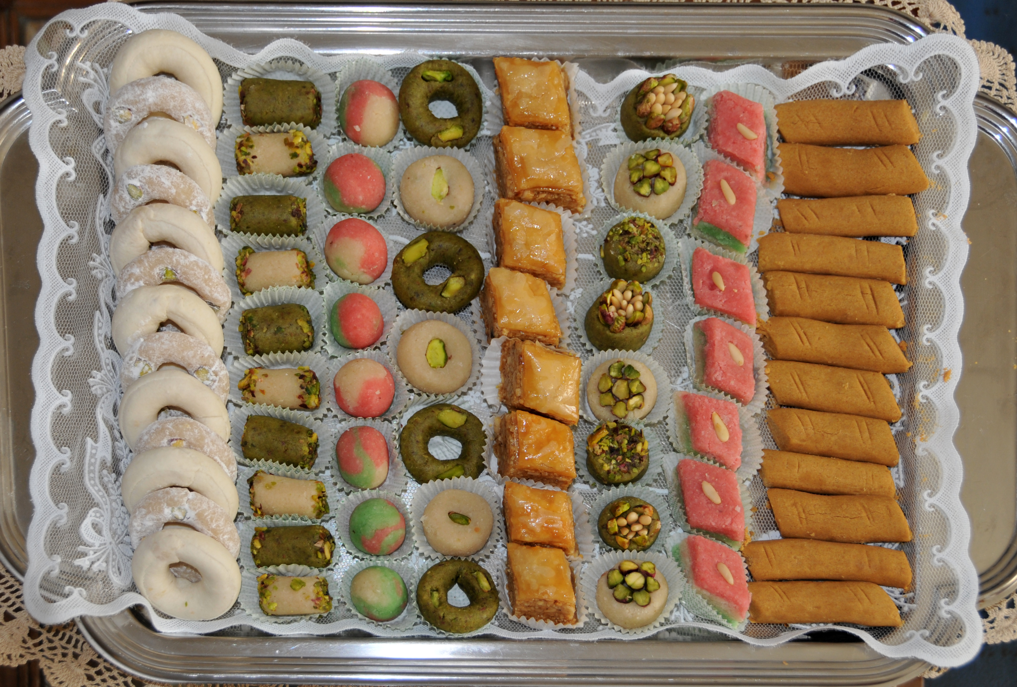 Un plateau de patisseries tunisiennes. On distingue certains types de patisseries : 1re rangée de gauche : Kâak ourka à base de pâte d'amande de deux types (l'une est fariné avec du sucre en poudre) 5e rangée à partir de la gauche : Baklawa 1re rangée de droite : Ghraïba de pois chiches Les autres rangées sont composées de pâtisseries à base d'amandes ou de pistaches. Toutes ces patisseries sont faites maison, à part les baklawas.